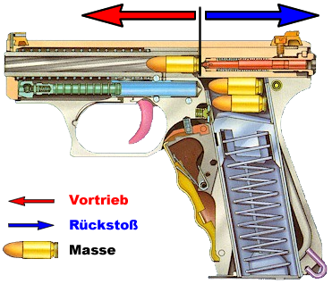 Selbsterstellt